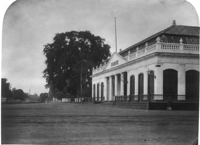 Foto. Societeit De Harmonie, Batavia.